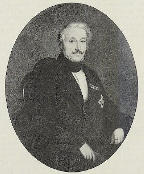 Friedrich Theodor Schaaf (1792-1876); von 1831 bis 1866 war Schaaf als Abgeordneter des Amtwahlbezirks 37 (Amt Eberbach und Orte des Amtes Mosbach) Mitglied der Zweiten Kammer der Badischen Ständeversammlung.